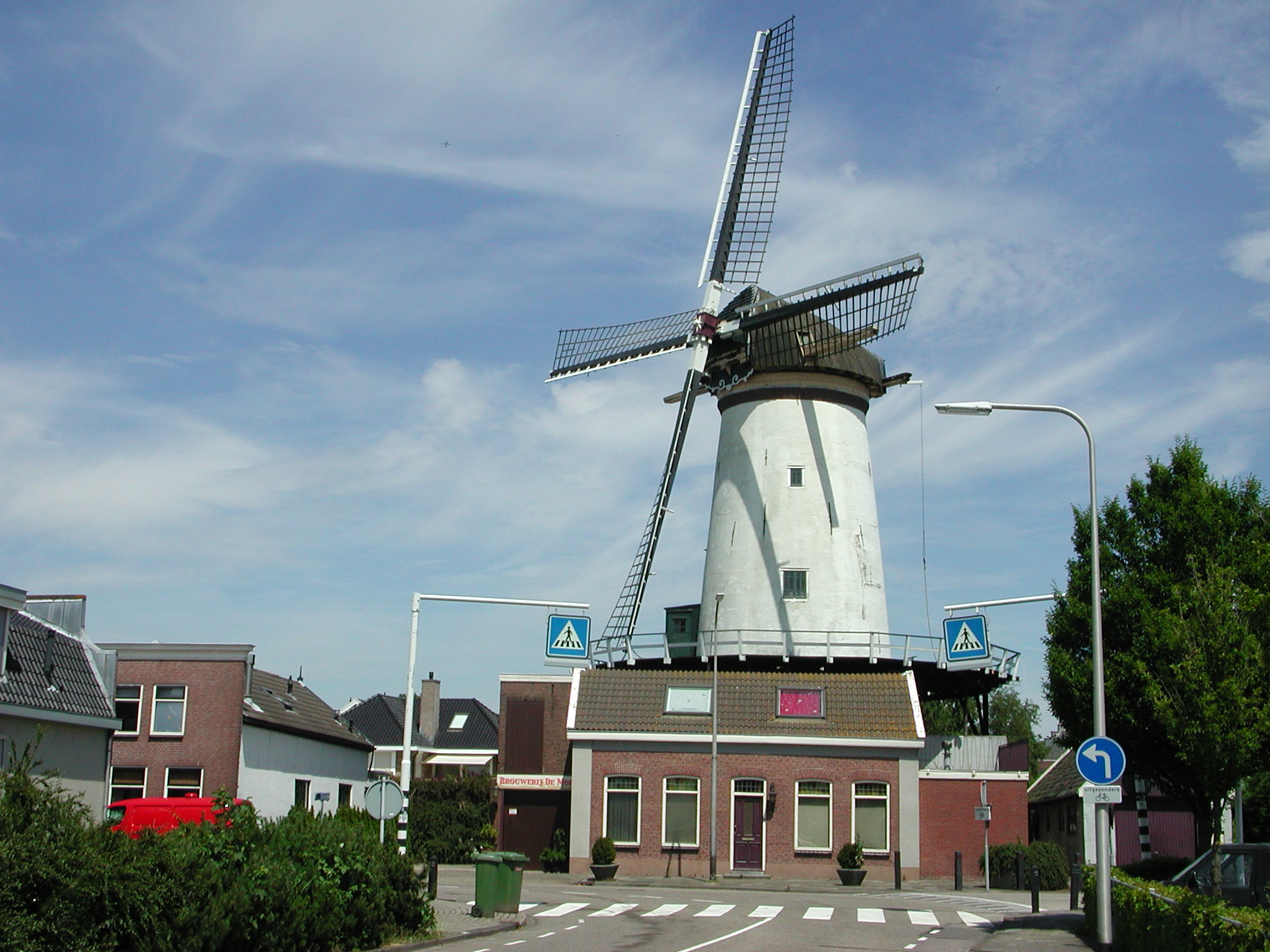 Molen De Arkduif te Bodegraven. Auteur P.H. Louw, eigen werk, foto vrij voor gebruik (foto 20 juni 2005) Adres: Overtocht 45, 2411 BT Bodegraven